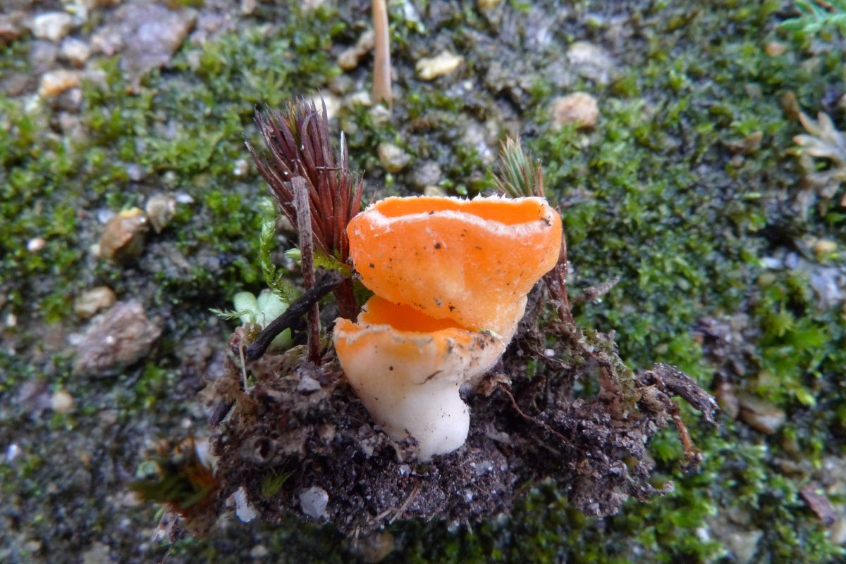 Neottiella rutilans, pointe du Raz (Plogoff, Finistère, Bretagne, France)